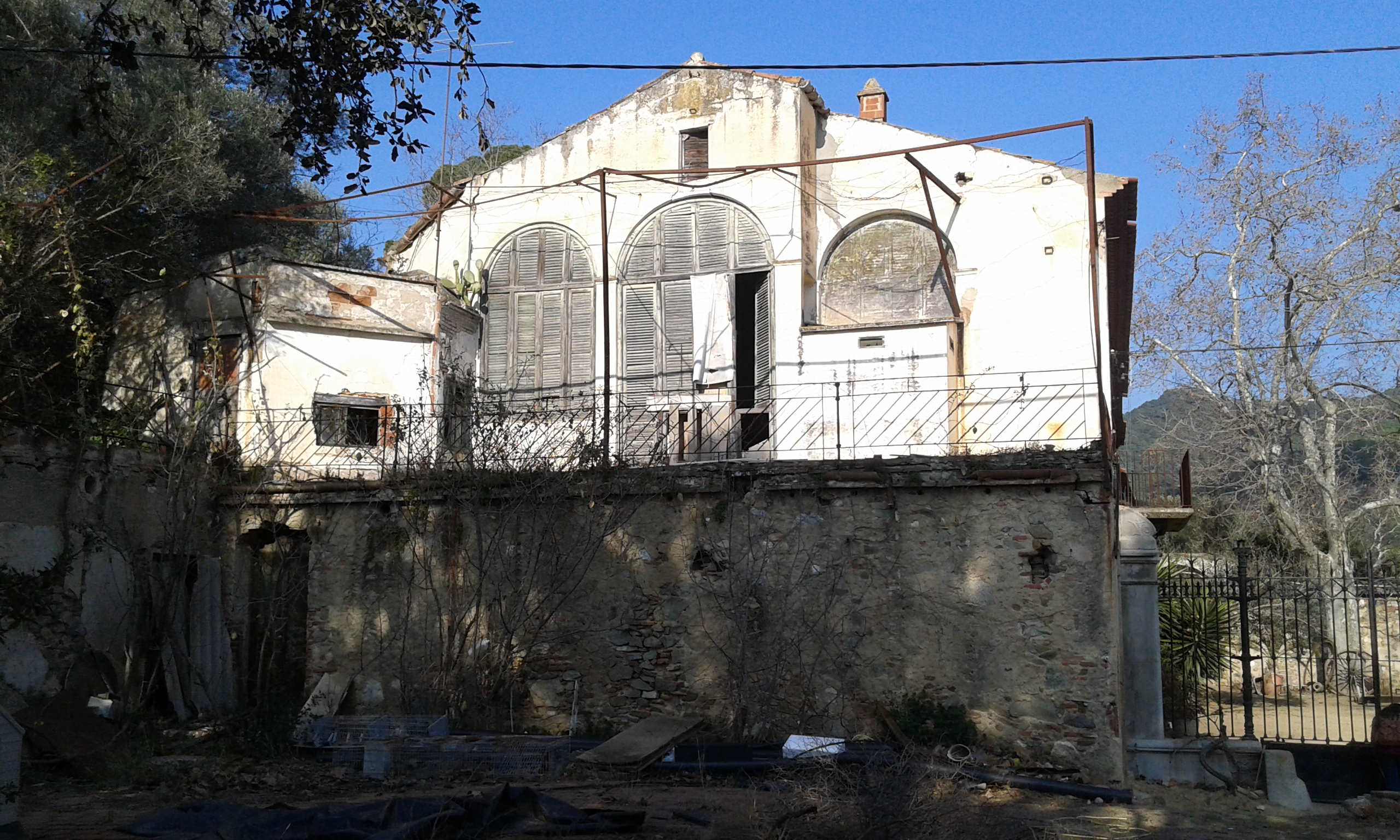 Casa de campo